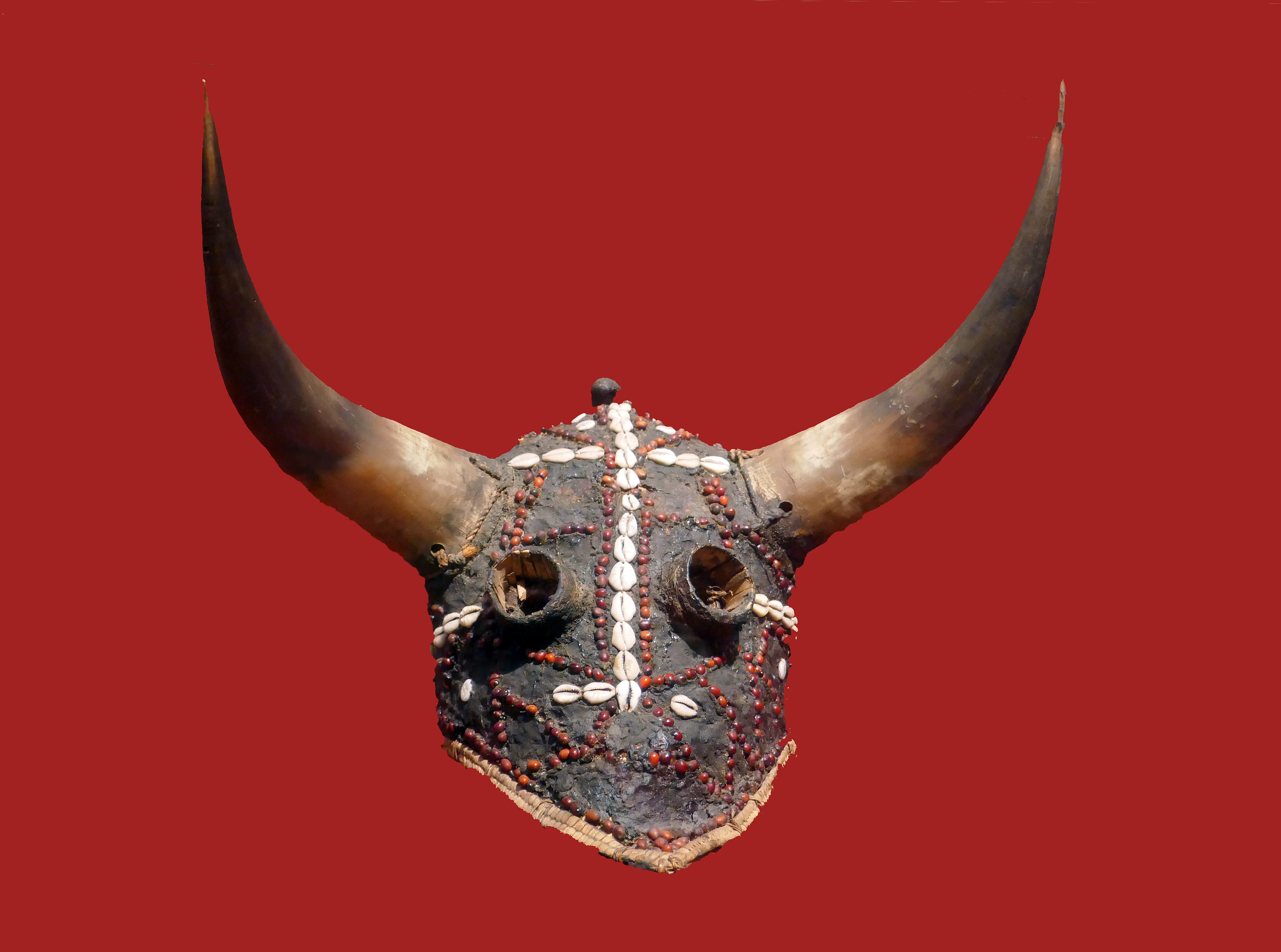 Masque ejumba' (apparaît uniquement au cours du bukut, cérémonie d'inititiation des jeunes gens, le plus souvent accompagné d'une longue robe de fibres cachant le danseur). Cornes de boeuf, graines dAbrus precatorius, cauris, boutons de fabrication occidentale et vannerie. Diola, Sénégal, 19e s. ou début du 20e siècle. Musée d'Angoulême. Legs Dr. Lhomme, 1934.